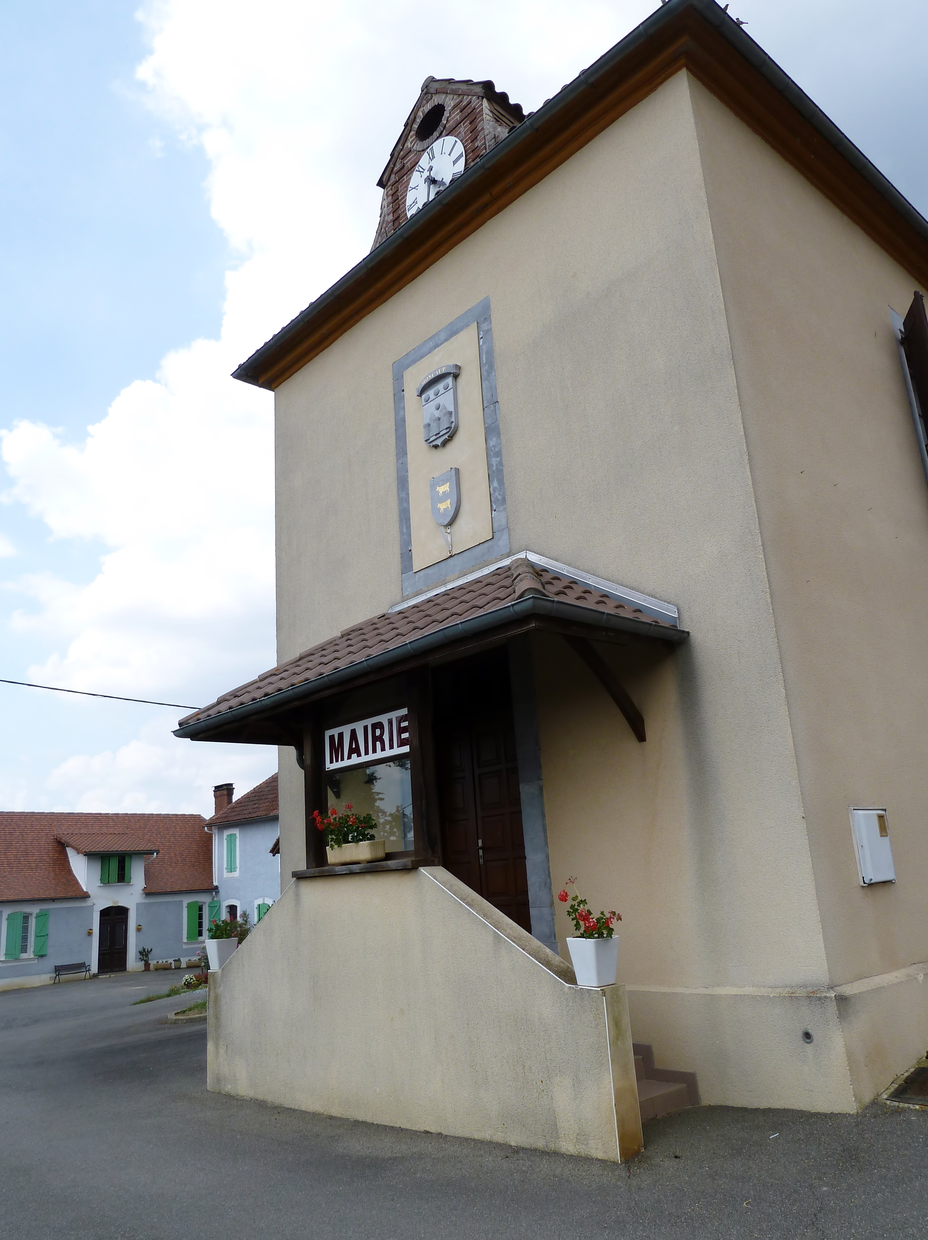 Mairie de Moncaup (Pyrénées-Atlantiques)